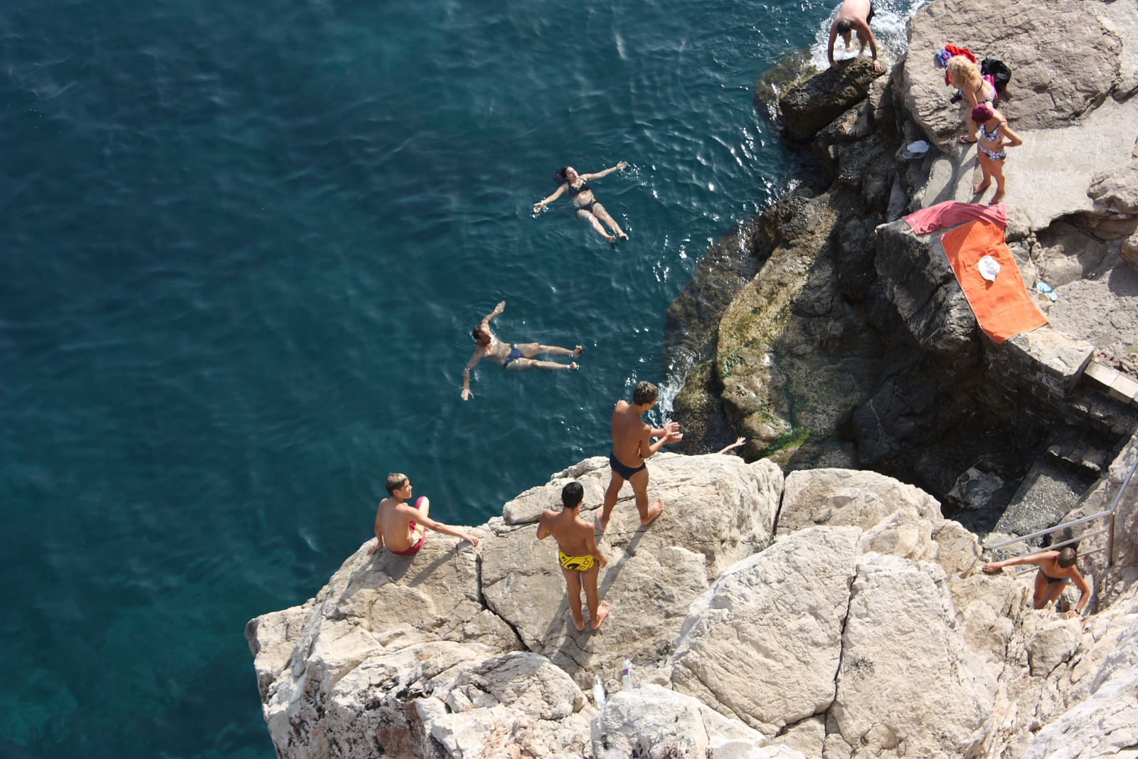 Dubrovnik